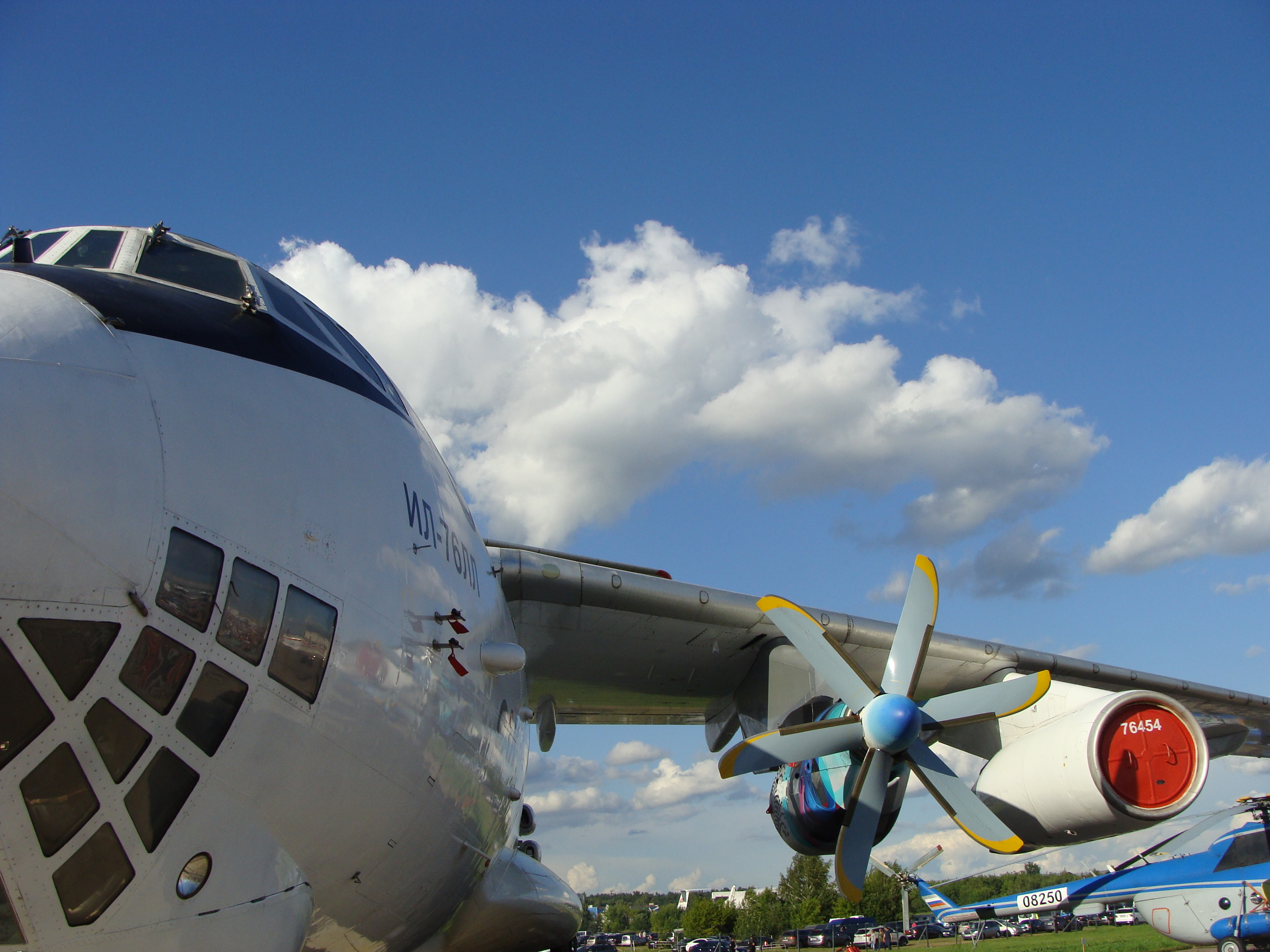 Ил-76 ЛЛ с эксперементальным турбовинтовым двигателем ТВ7-117СТ.